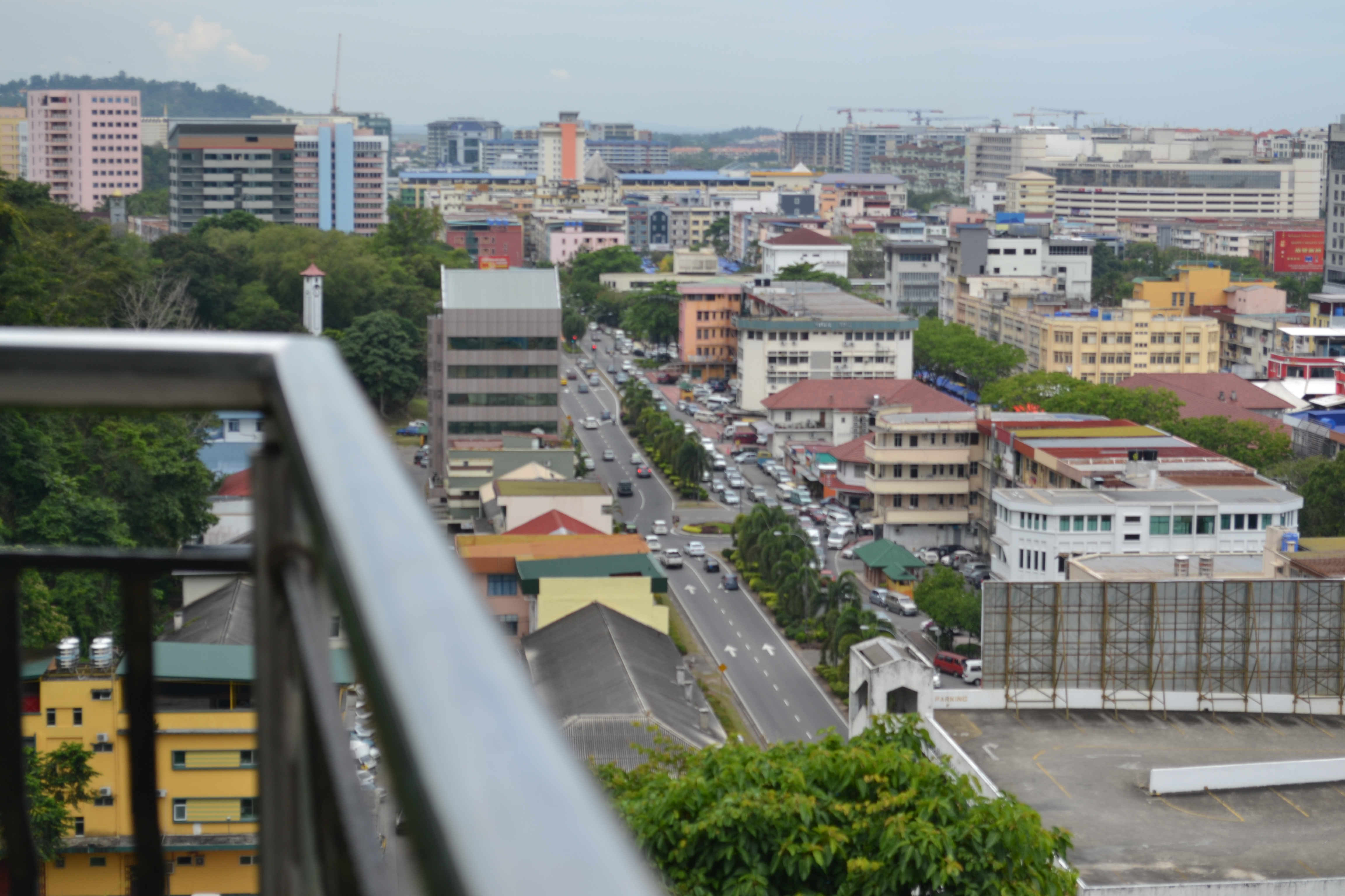 Keindahan Pucak Bukit Bendera Sabah